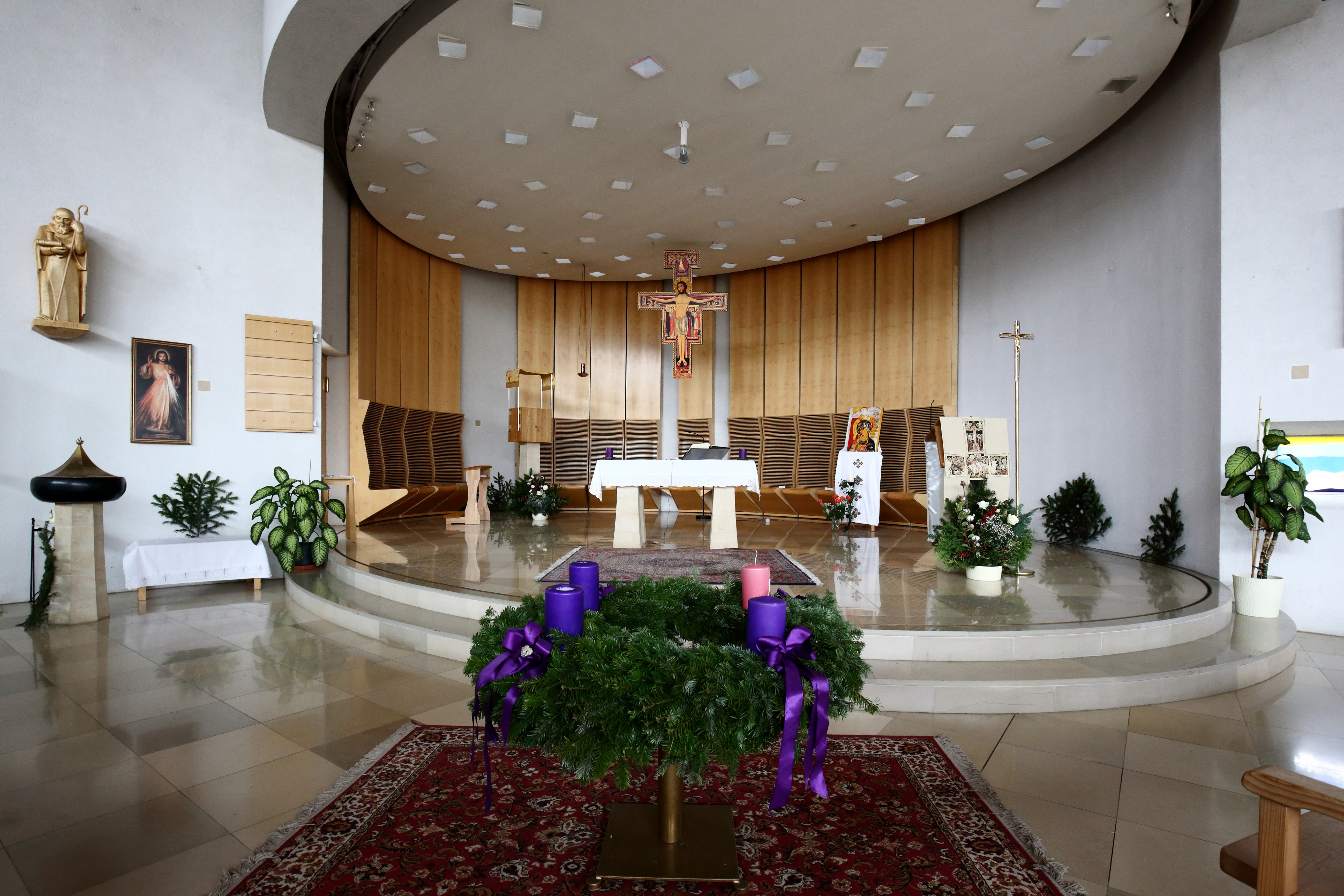 Altarraum der Pfarrkirche St. Benedikt am Leberberg im 11. Wiener Gemeindebezirk Simmering.